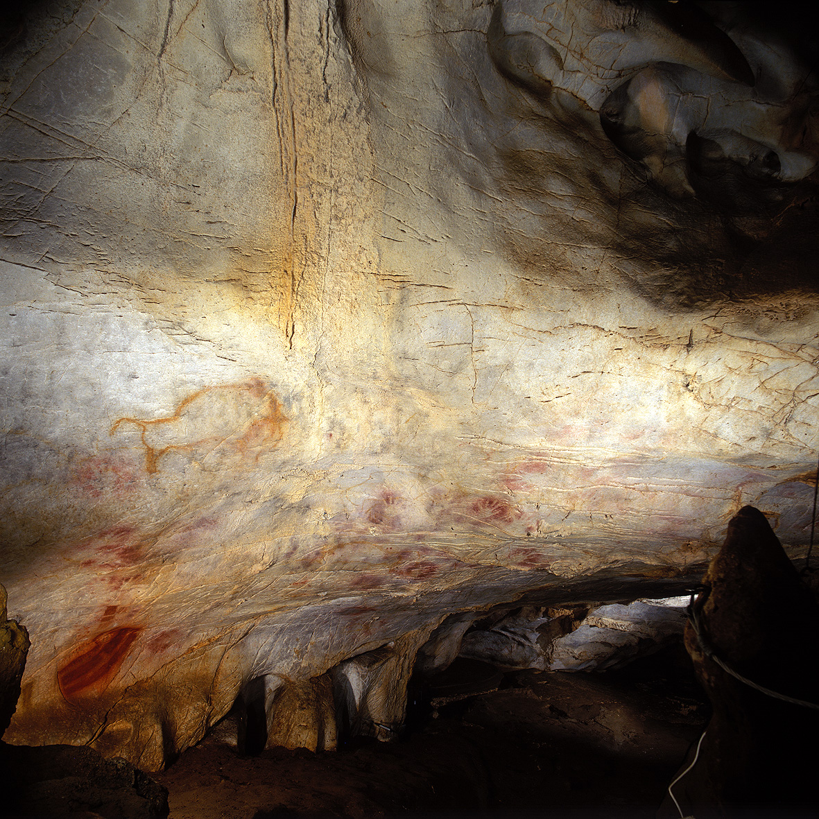 Interior de la Cueva del Castillo en Puente Viesgo, Cantabria (España). Se observan las pinturas prehistóricas del Paleolítico Superior.